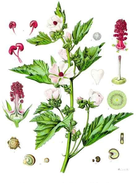 Echter Eibisch. A Pflanze in natürl. Grösse; 1 Kronblatt, desgl.; 2 Staubfadenröhre mit den Ansätzen der Kronblätter vergrössert;3 Blüthe im Längsschnitt, desgl.; 4 u. 5 Staubgefässe, desgl.; 6 Pollen, desgl.; 7 Stempel, desgl. ; 8 Fruchtknoten im Querschnitt, desgl.; 9 Frucht, natürl. Grösse; 10 einzelnes Früchtchen, natürl. Grösse und vergrössert; 11 u. 12 dasselbe in verschiedenen Längsschnitten, desgl.; 13 Same, natürl. Grösse und vergrössert.